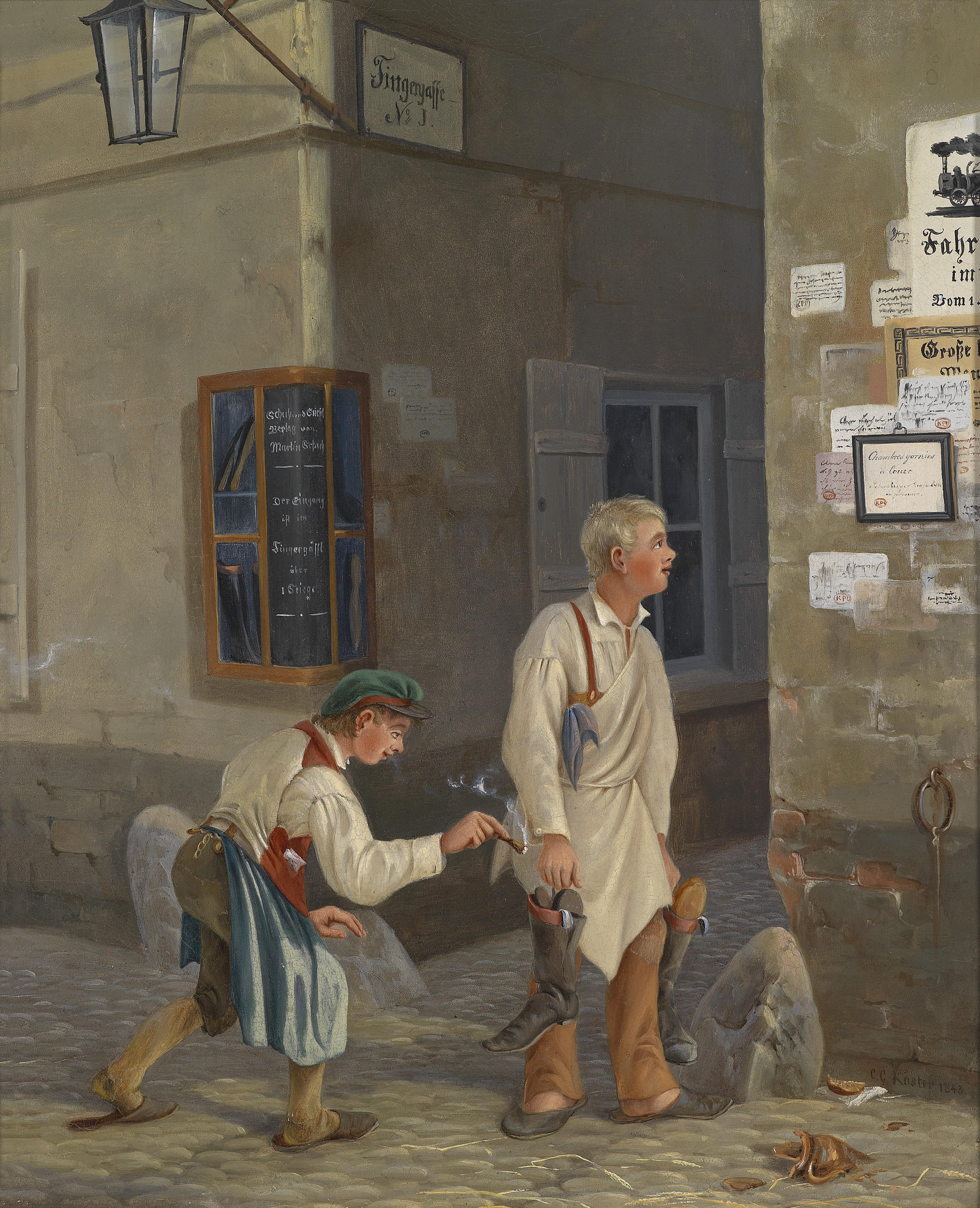 Der kleine Lausbub, signiert, datiert C. G. Köster 1848, Öl auf Leinwand, 34,5 x 28 cm